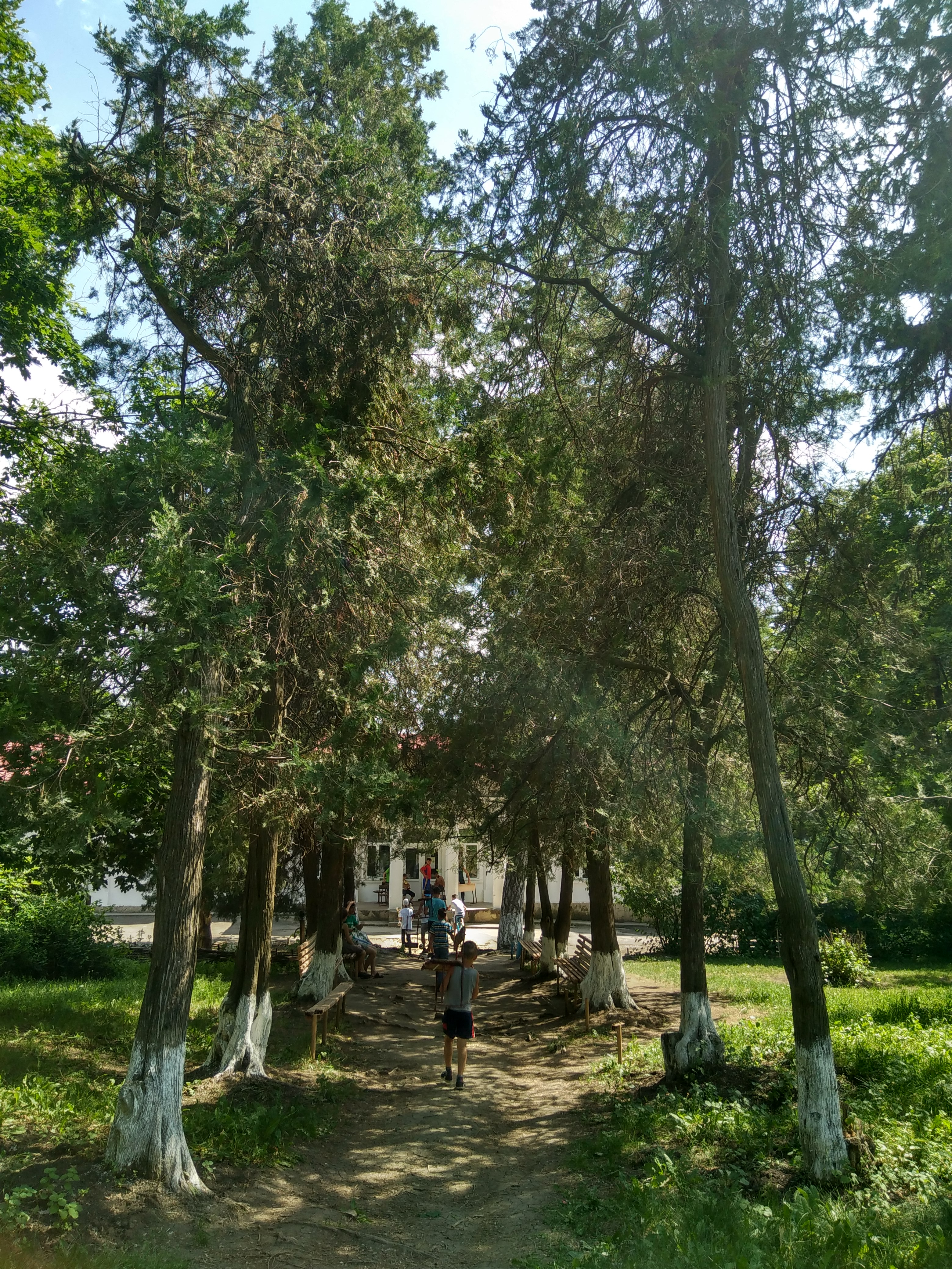 Parcul din satul Miclești, monument al naturii amplasat în raionul Criuleni, satul Miclești (cod MD-CR-map-008)